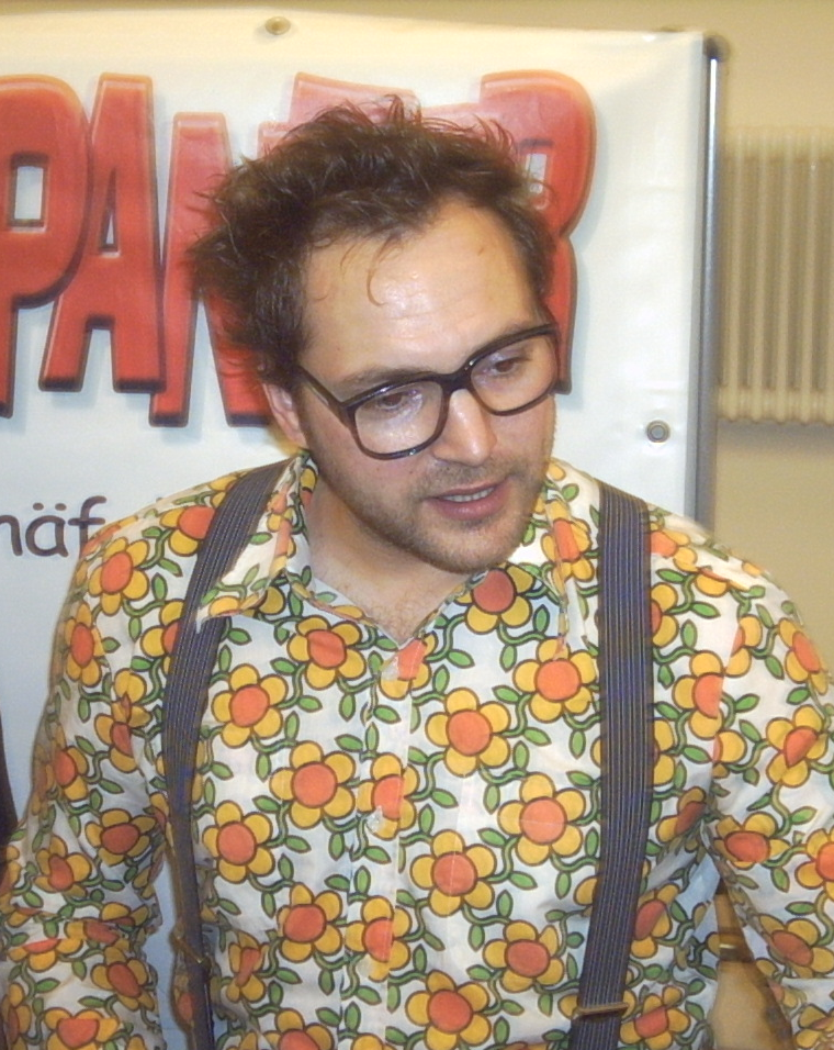 Paul Panzer (Dieter Tappert) live auf dem "Heimatabend deluxe" in Neustadt an der Weinstraße